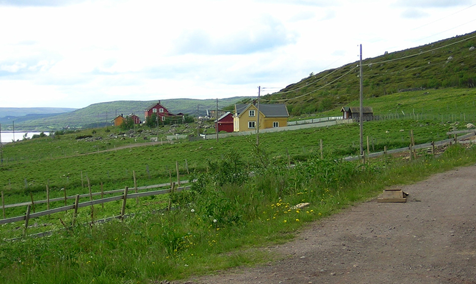 From Abelsborg, Nesseby, Finnmark, Norway.